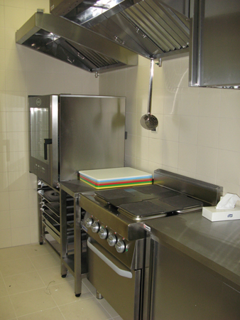 Кухня в отеле. Часть небольшой подборки красивых фотографий кухонь разных мест (отели, рестораны, столовые), найденных на сайте со свободной лицензией (см.источник)